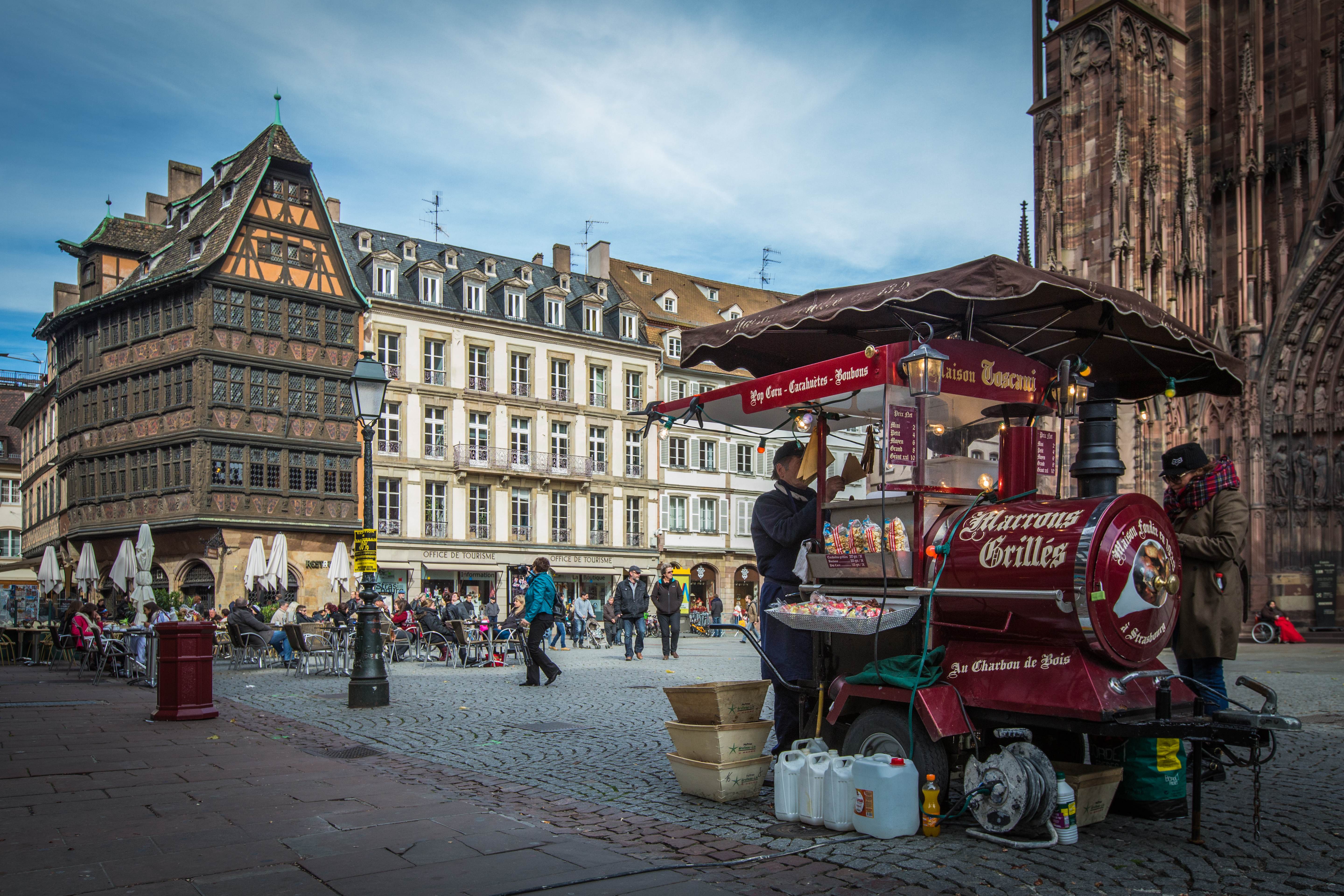 Strasbourg, place de la Cathédrale, marchand de marrons chauds octobre 2013.